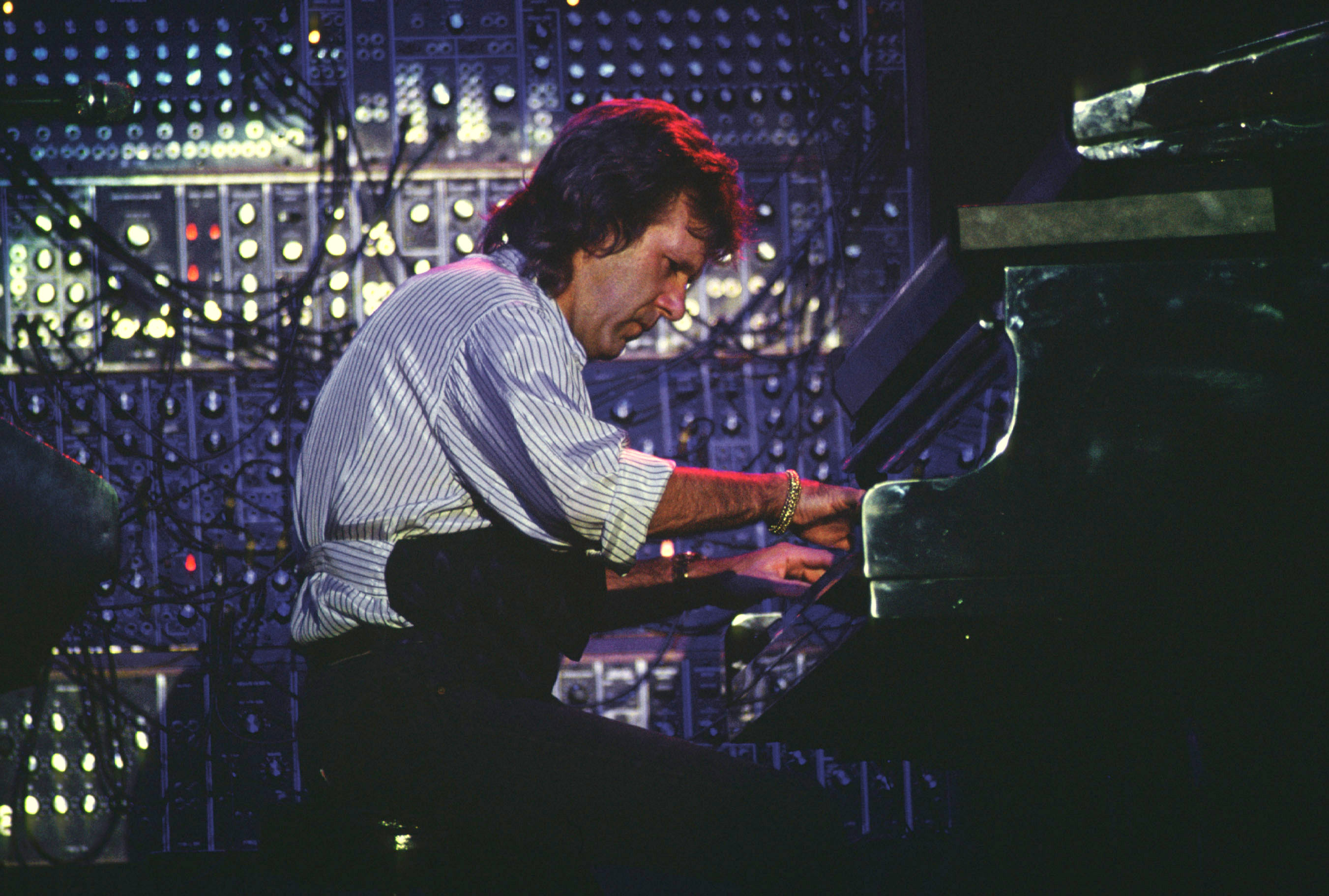 Keith Emerson del gruppo progressive-rock Emerson, Lake & Palmer in concerto nel 1992